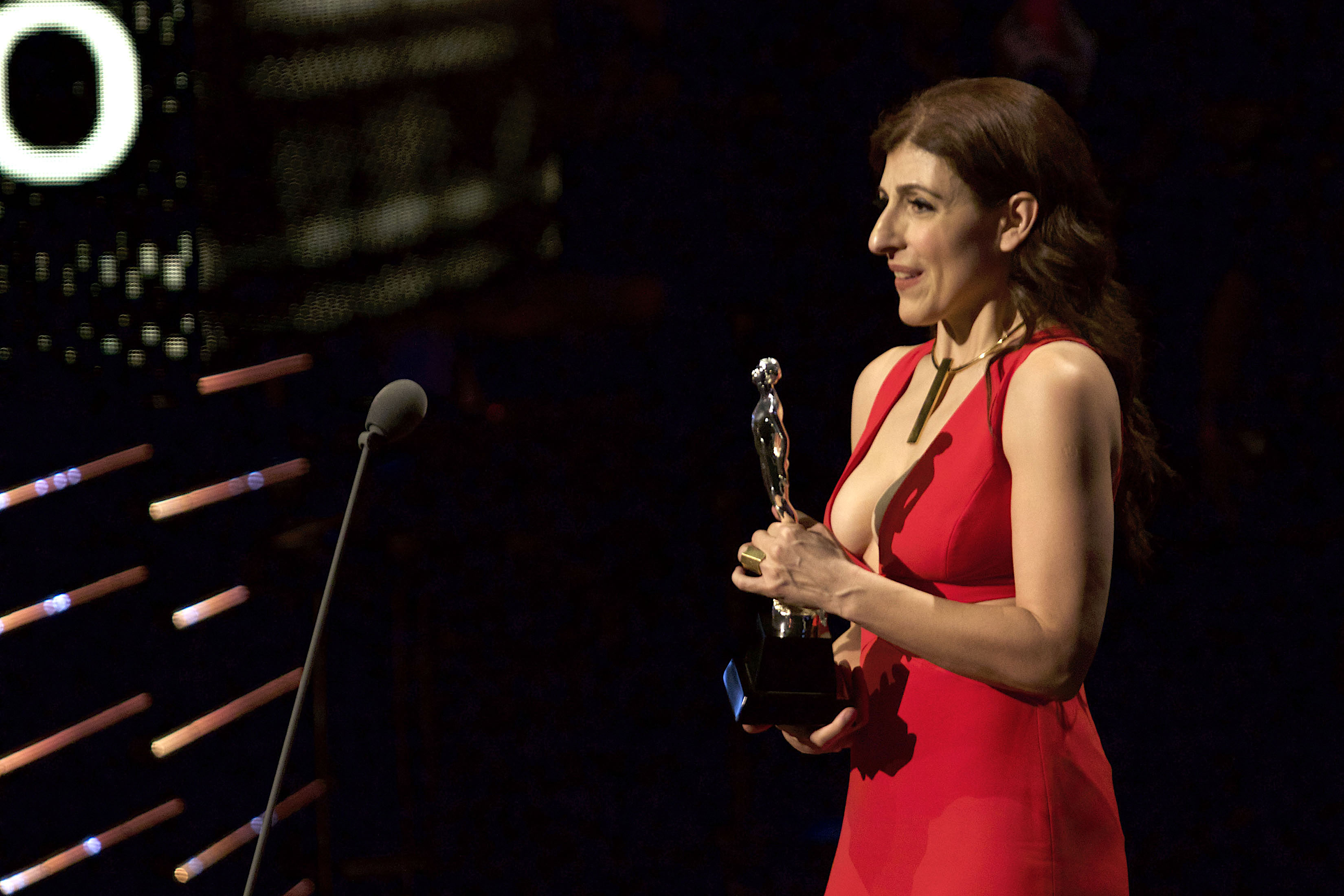 Mejor actriz Karina Gidi por Los Adioses.